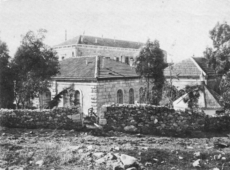 בית זקנים מאוחד